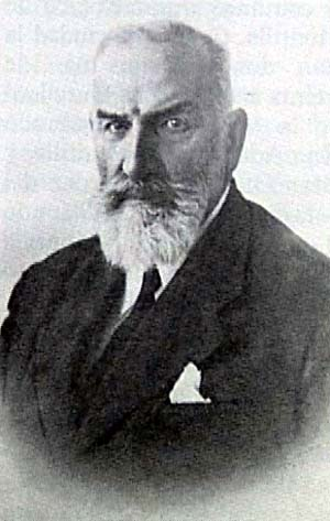 Tradicionalista y empresario vitivinícola.